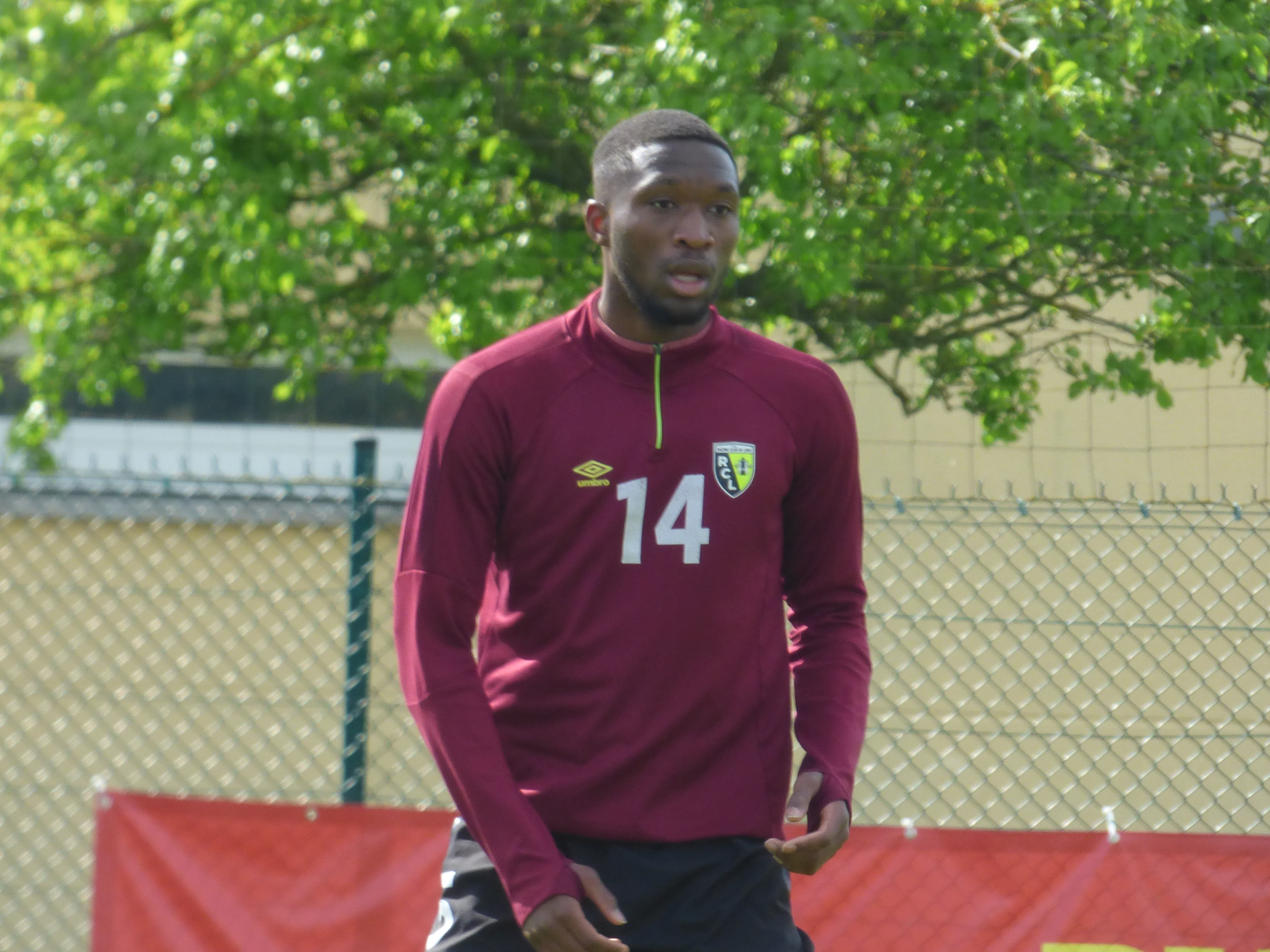 Modibo Sagnan lors d'un entraînement public du Racing Club de Lens au Centre technique et sportif La Gaillette, le 2 mai 2018.